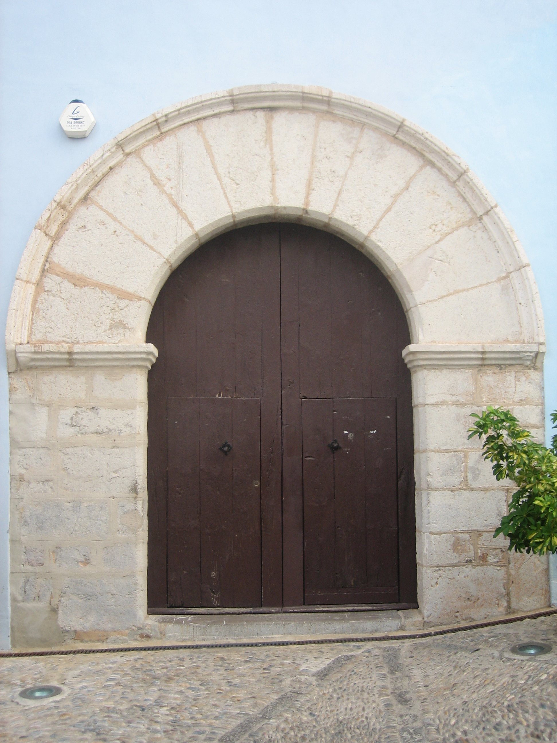 Portada de l'església de Santa Maria de Peníscola (Baix Maestrat)